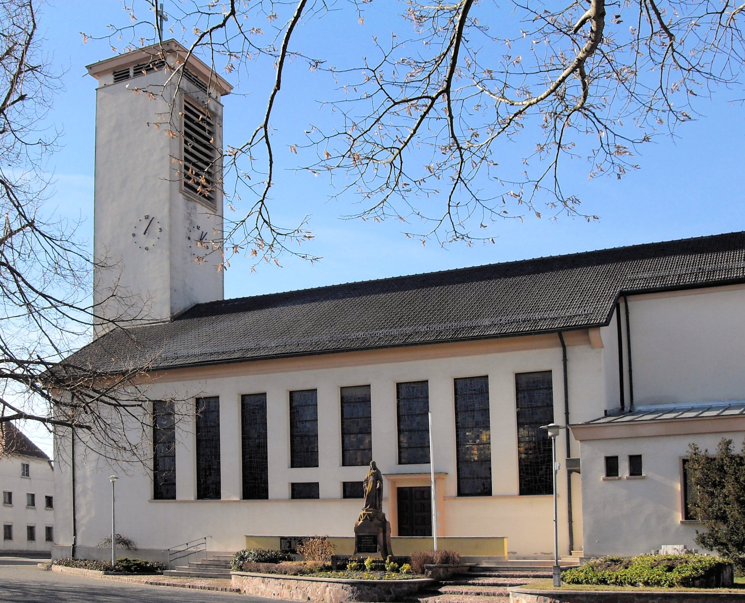 L'église Sainte-Agathe à Munchhouse